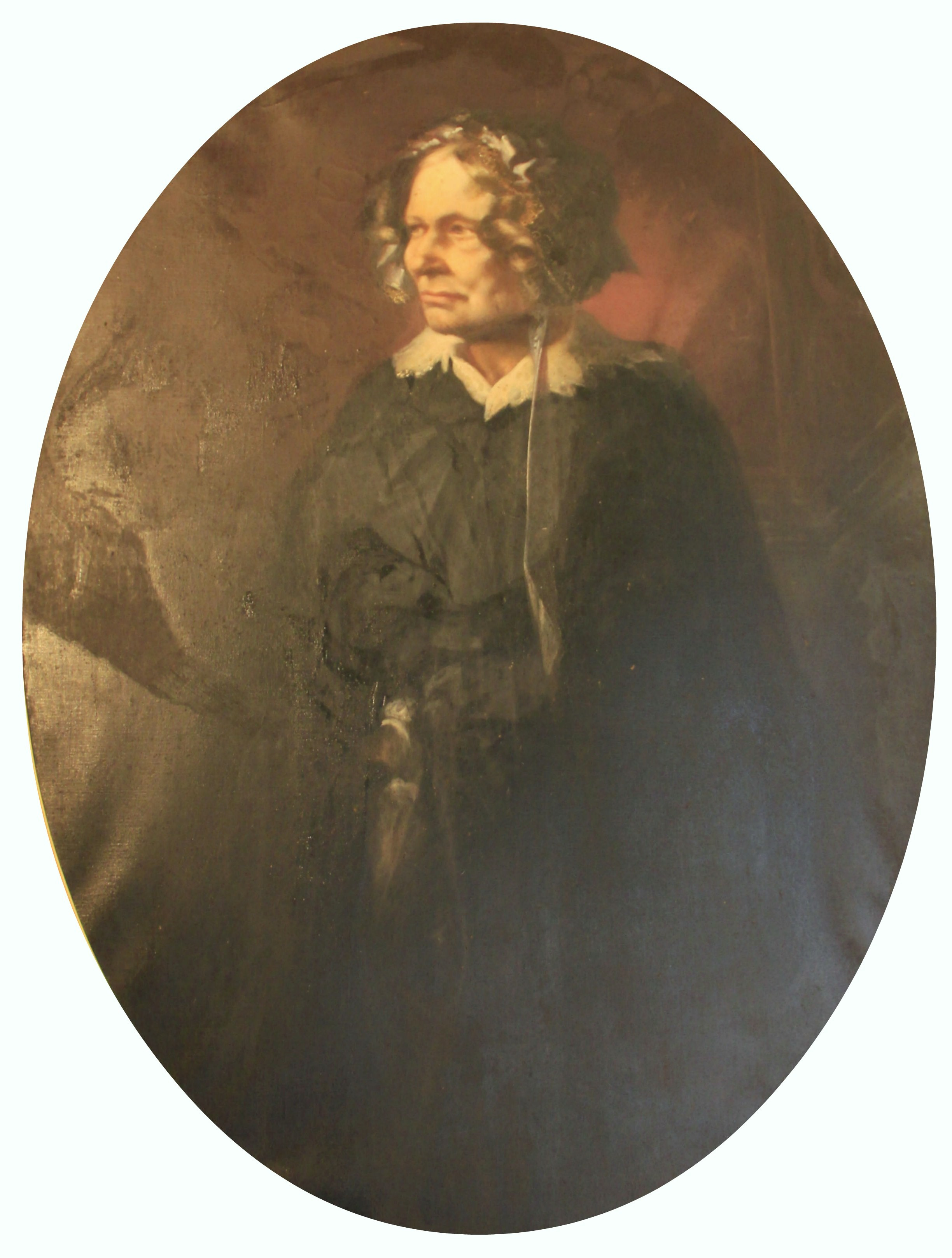 Роза Станиславовна Браницкая, ур. Потоцкая (1782—1862), в первом браке Потоцкая.